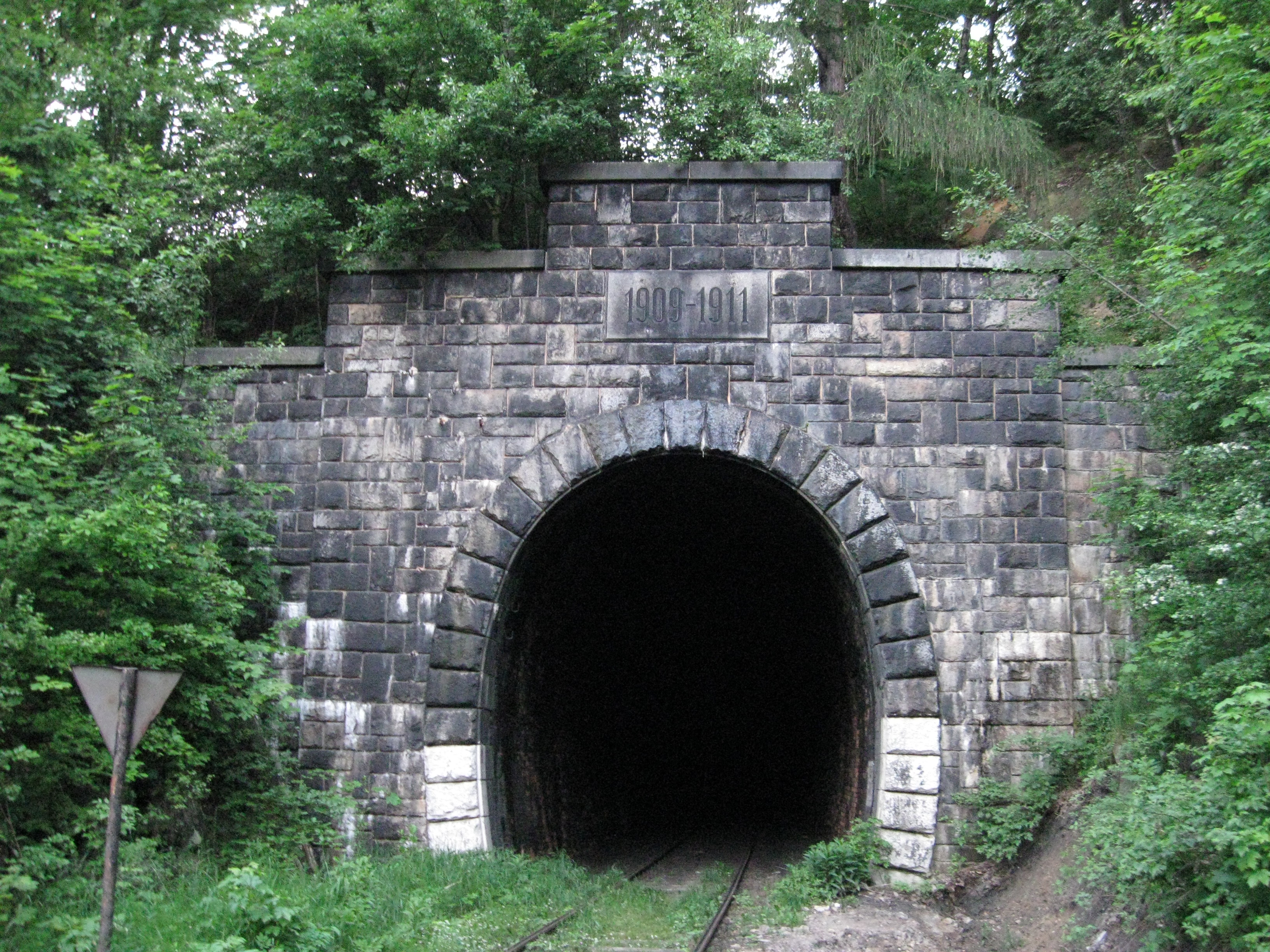 Tunel pod Małym Wołowcem, widok od strony Jedliny Zdroju (część czynna)